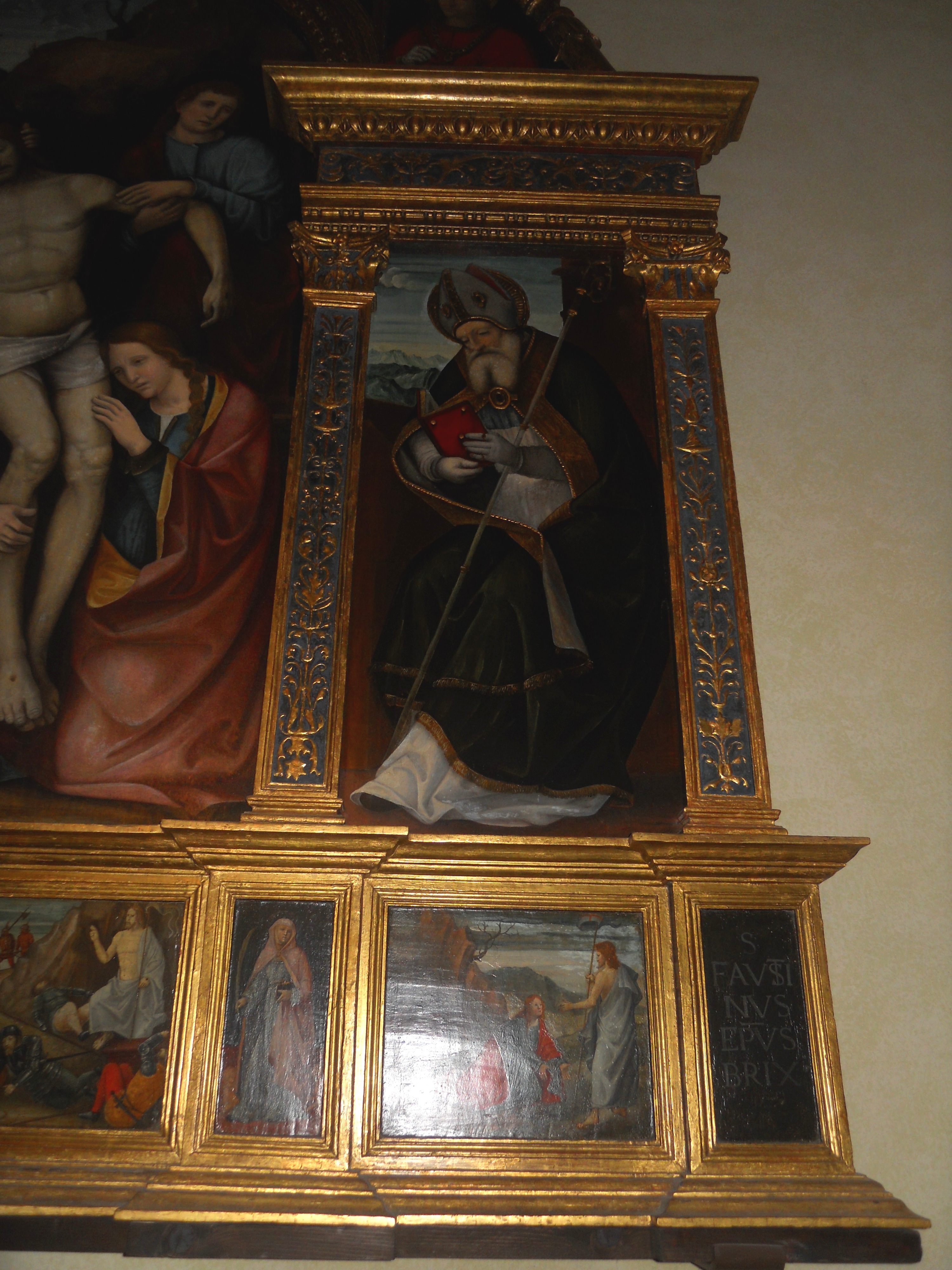 sant'angela merici (brescia) polittico3.jpg